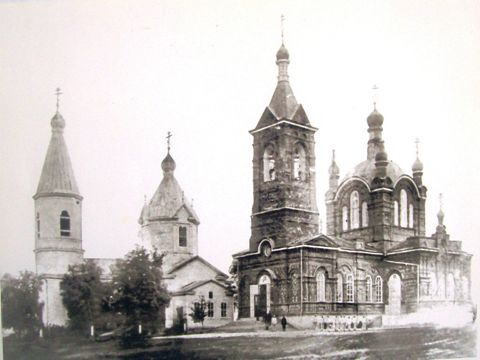 Покровский собор в Константиновске Ростовская область